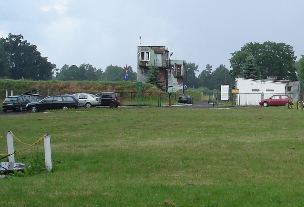 Obiekt szkoleniowy - strzelnica na której wykonywał strzelania 8br